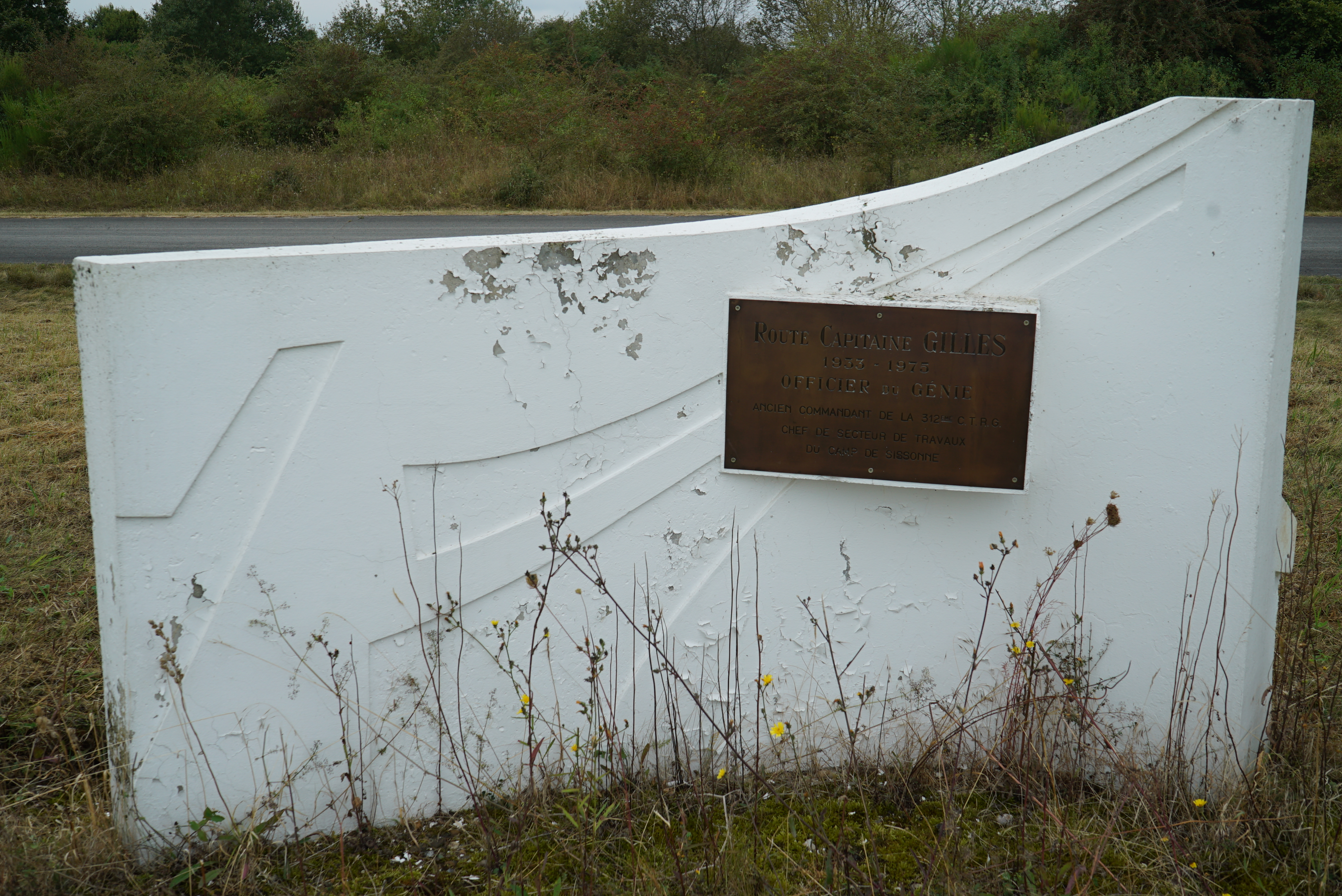 journée porte ouvertes .